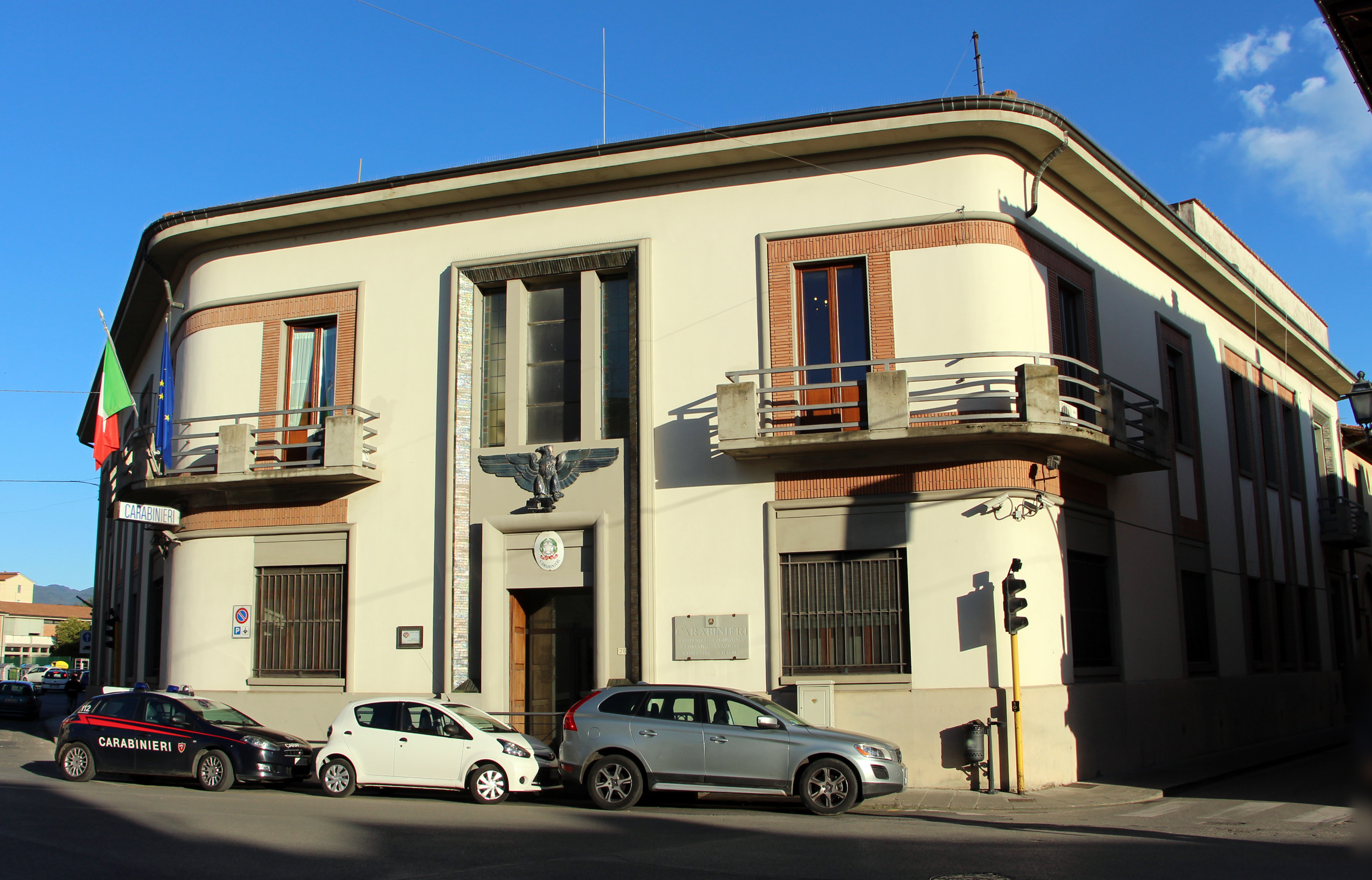 Borgo San Lorenzo